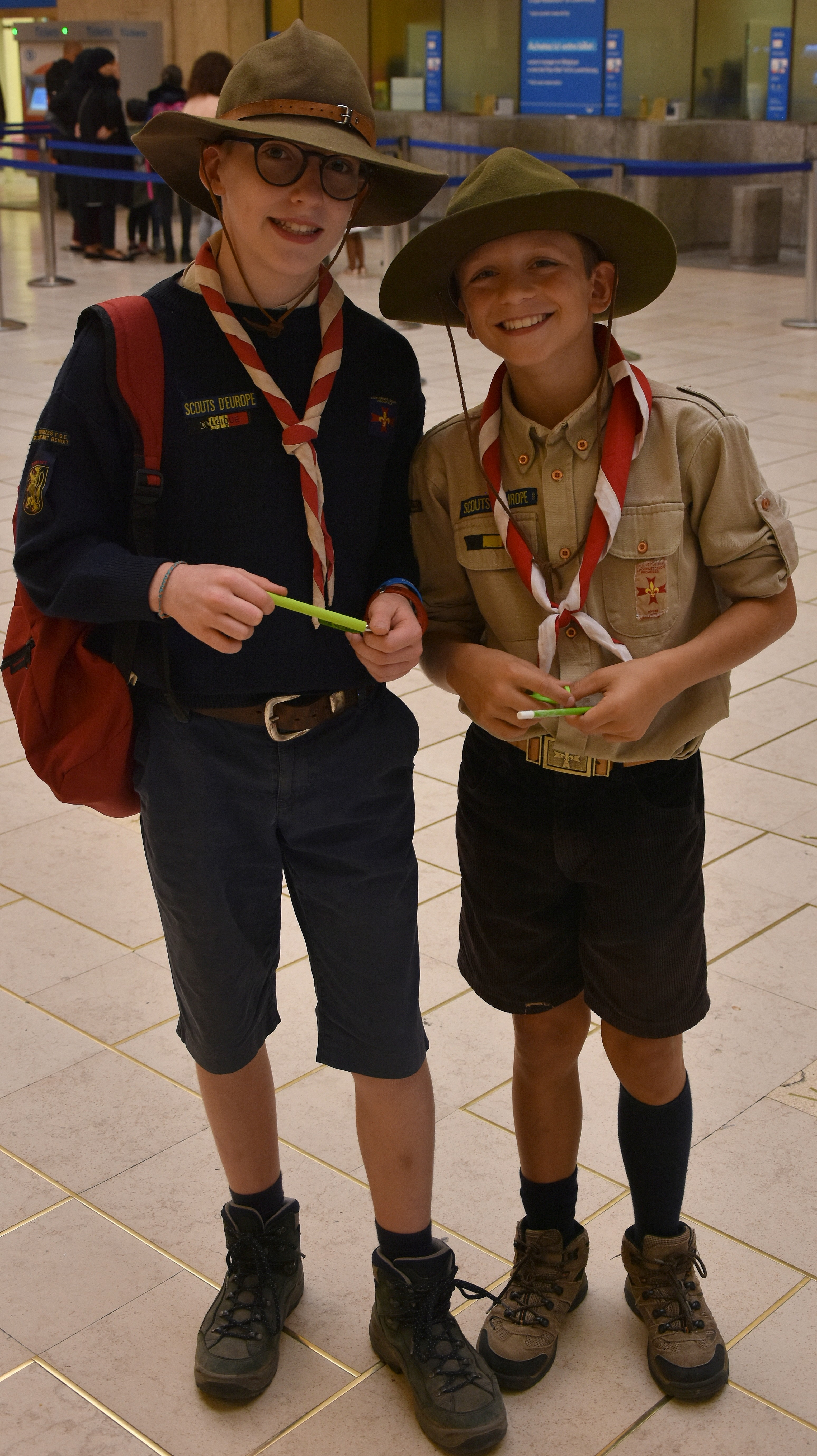 Europascouts in Brussel-Centraal 22-09-2018